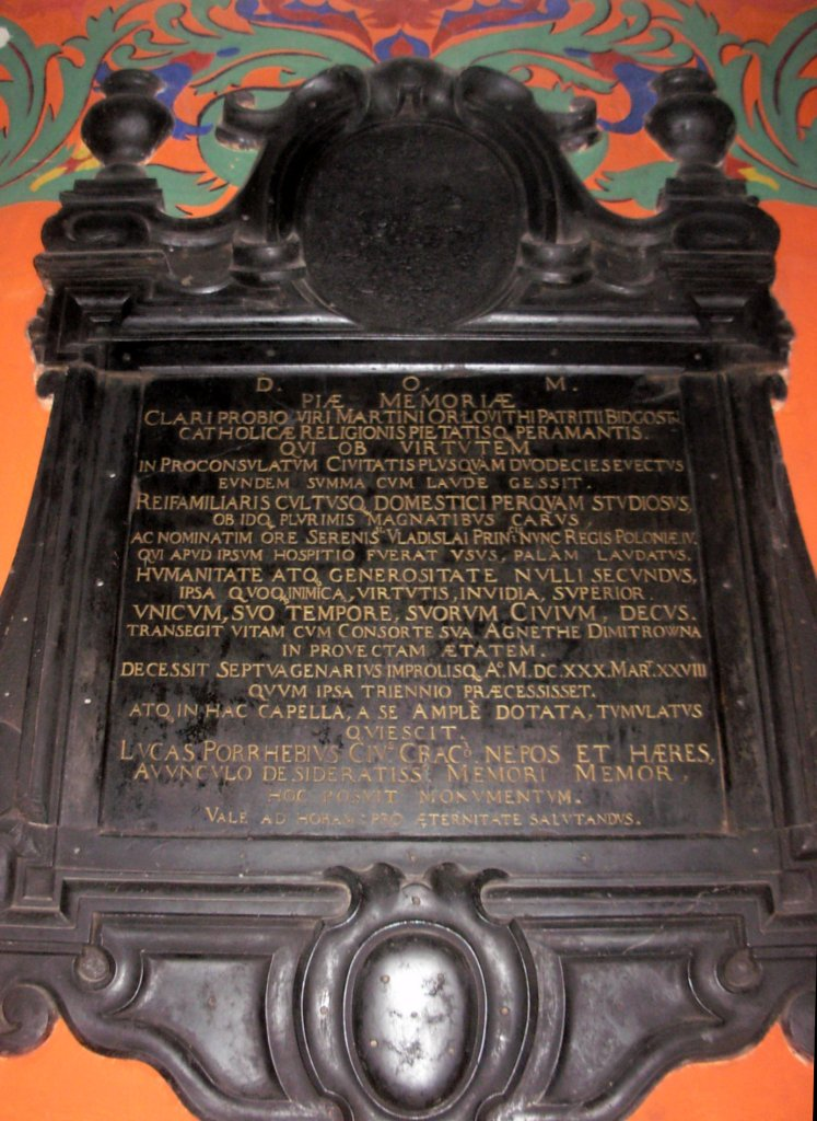 Barokowa, nagrobna płyta inskrypcyjna z czarnego marmuru w obramieniu kartuszowym (1630 r.) burmistrza bydgoskiego Marcina Orłowity (1560-1630), fundatora nieistniejącej kaplicy św. Anny. Znajduje się na ścianie południowej nawy, obok ołtarza św. Rocha.